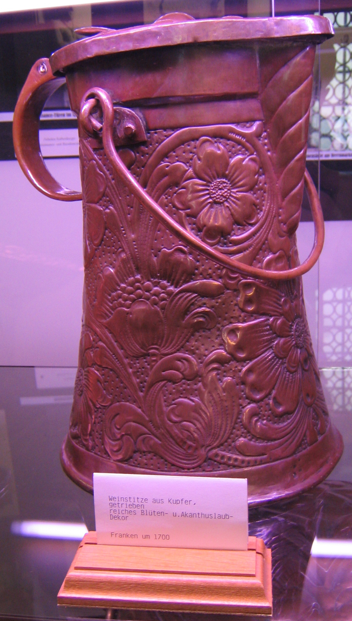 Weinstitze aus getriebenem Kupfer mit reichem Blüten- und Akanthuslaub-Dekor (Franken 190. Aufgenommen im Historiengewölbe und Staatsverlies von Rothenburg ob der Tauber, Deutschland